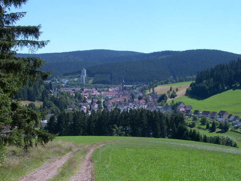 Furtwangen im Schwarzwald vom Meisterberg aus gesehen